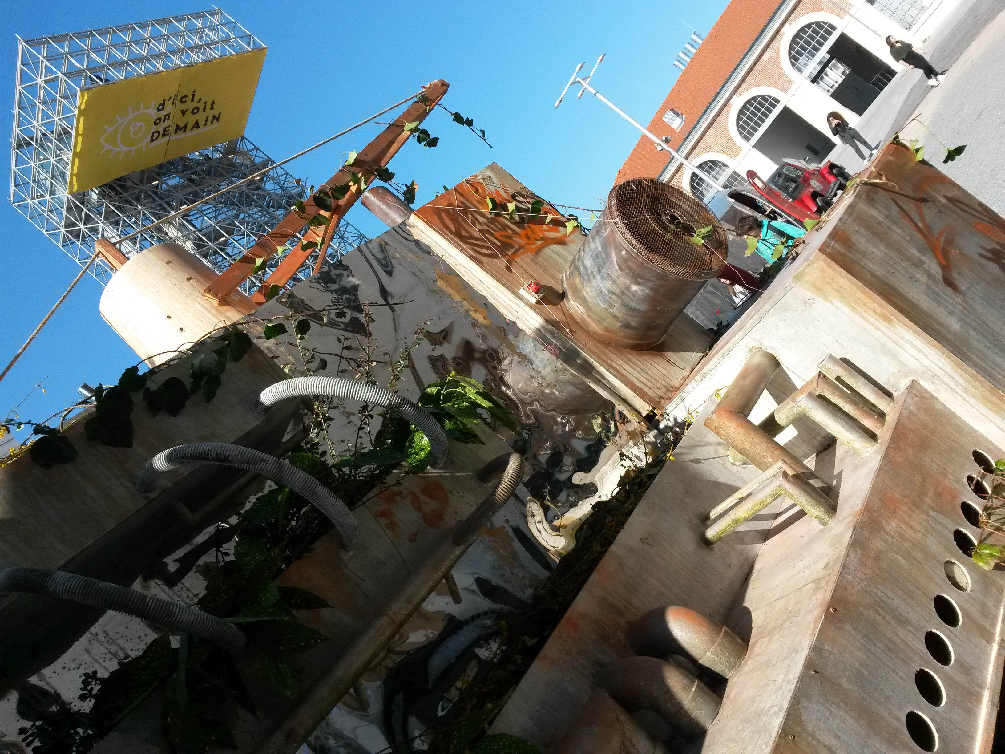 Un char végétalisé devant la Tour de l'Observatoire, Cité du Design de Saint-Etienne